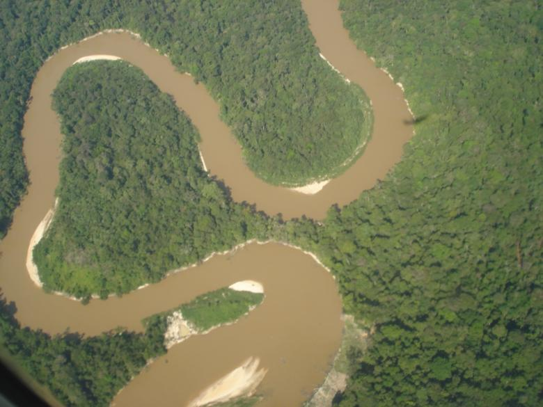 Rio Juruá, nas cercanias da cidade de Cruzeiro do Sul.